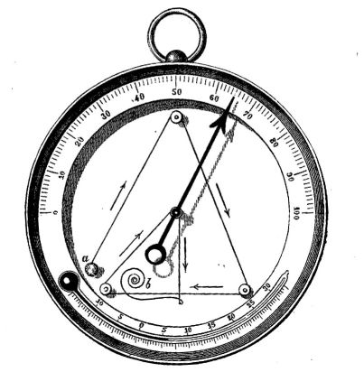 Eigen scan uit leerboek HBS (Japikse) eind 19e eeuw